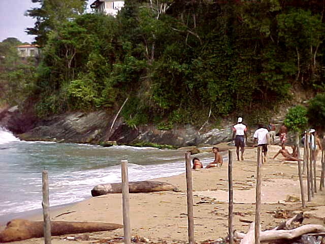 Chirimena pueblo costero de la región de barlovento en el estado Miranda - Venezuela (2000)